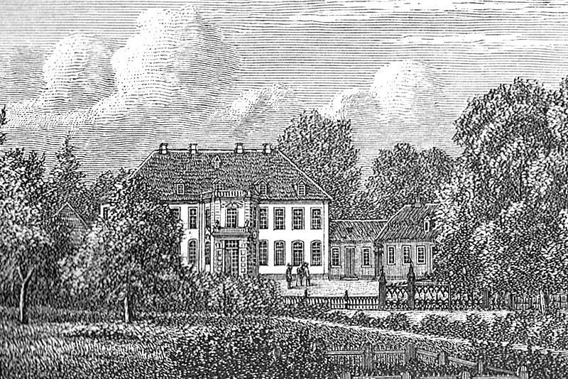 Langesø er en gammel gård, som nævnes første gang i 1415. Langesø ligger i Vigerslev Sogn, Skovby Herred, Søndersø Kommune. Hovedbygningen er opført i 1775